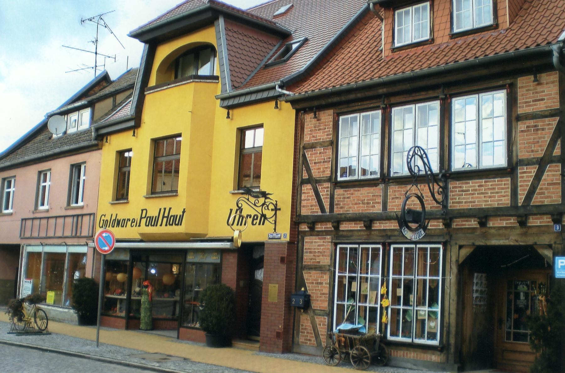 Traditionsreiches Geschäft in Seehausen